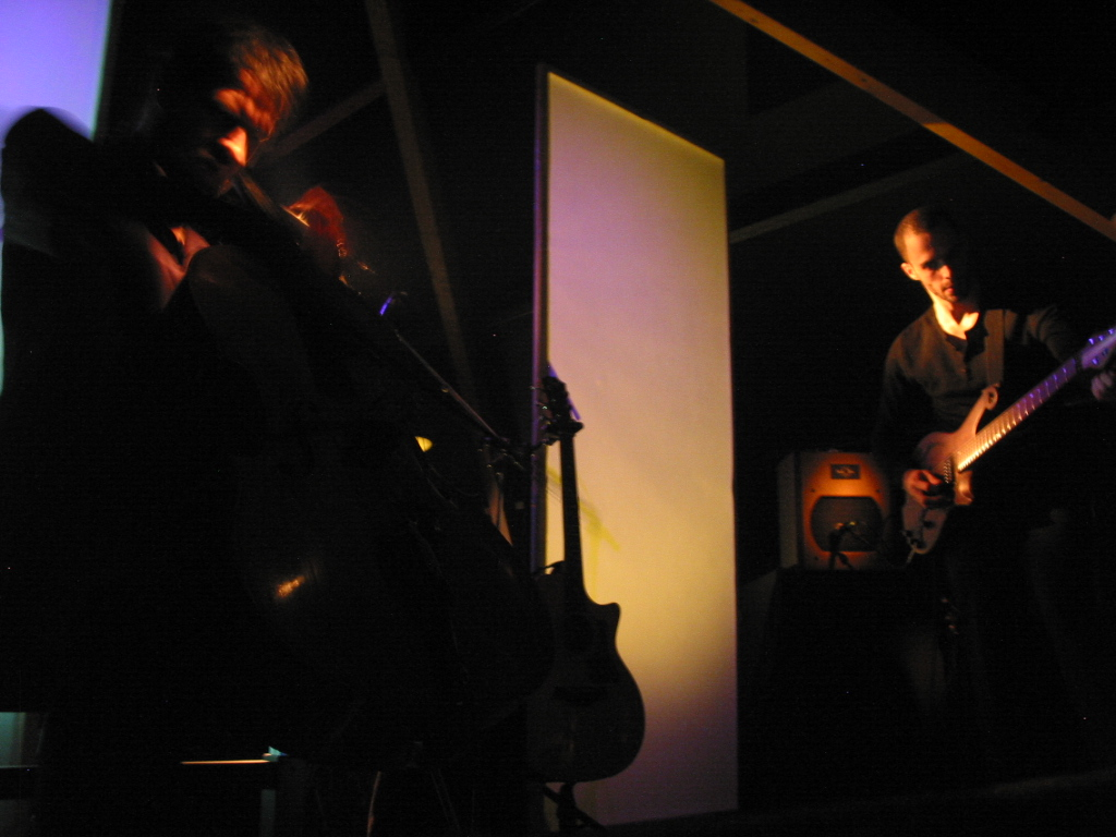 Pierre Le Bourgeois (à gauche) et Nosfell (à droite) en concert à l'Appel d'Airs (Trébry) en 2005.